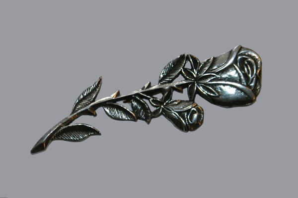 Elke veteraan die nog steeds een relatie heeft met zijn toenmalige partner, kan voor haar of hem de zilveren roos aanvragen via de website van het Veteraneninstituut.